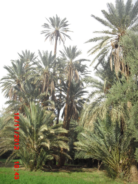 palmier dat